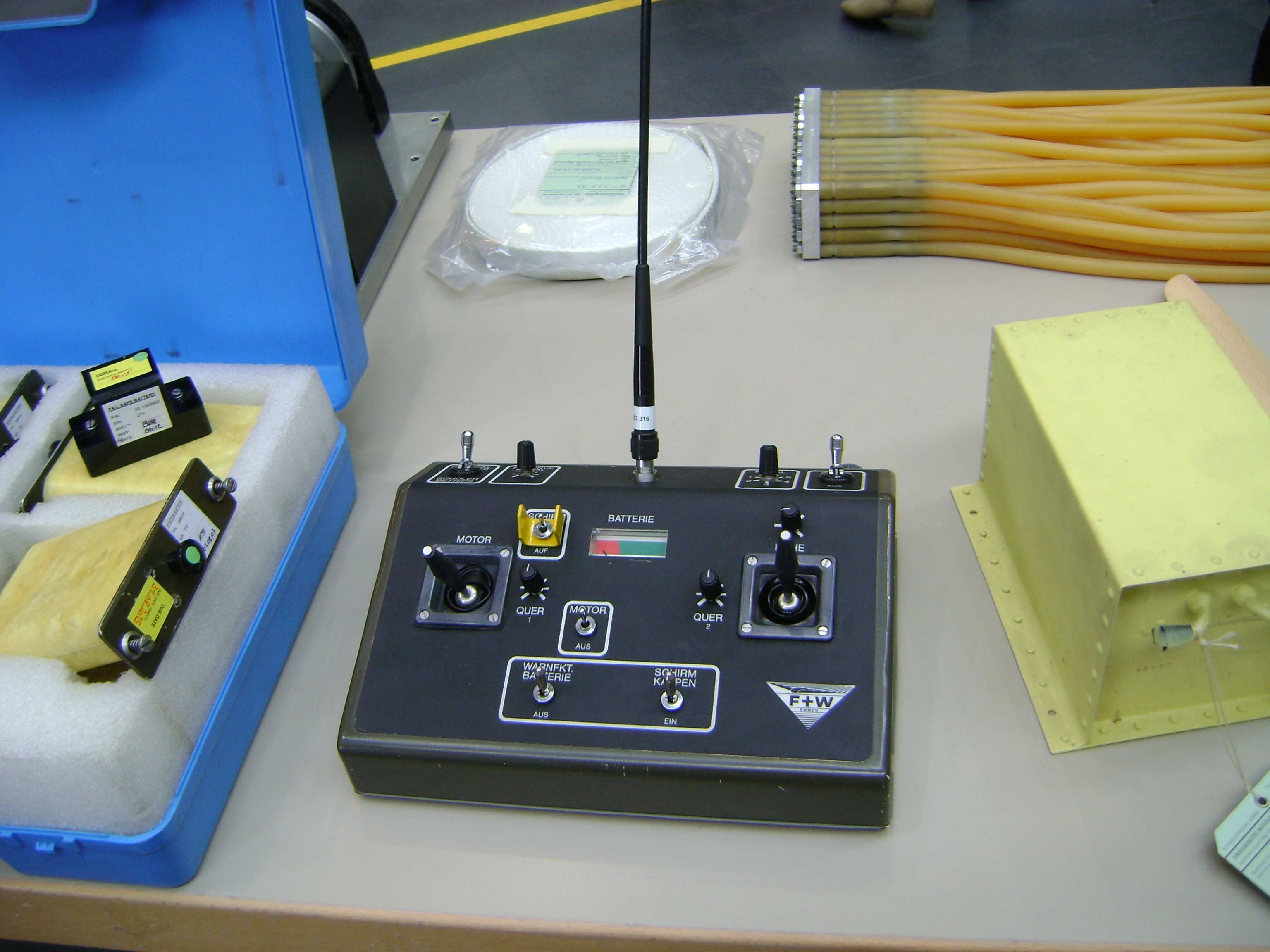 fernsteuerung Zieldrohne